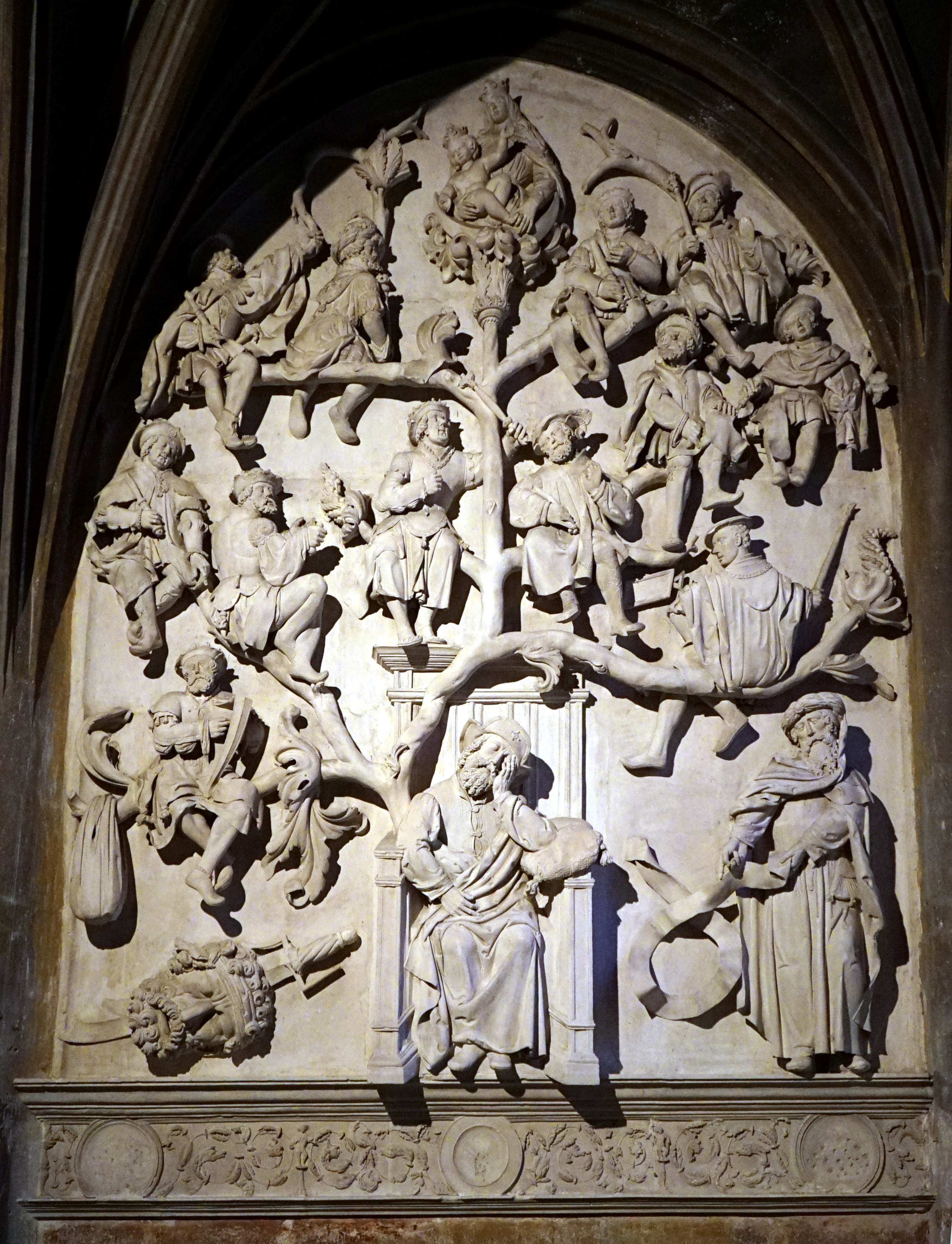 en la basilique.